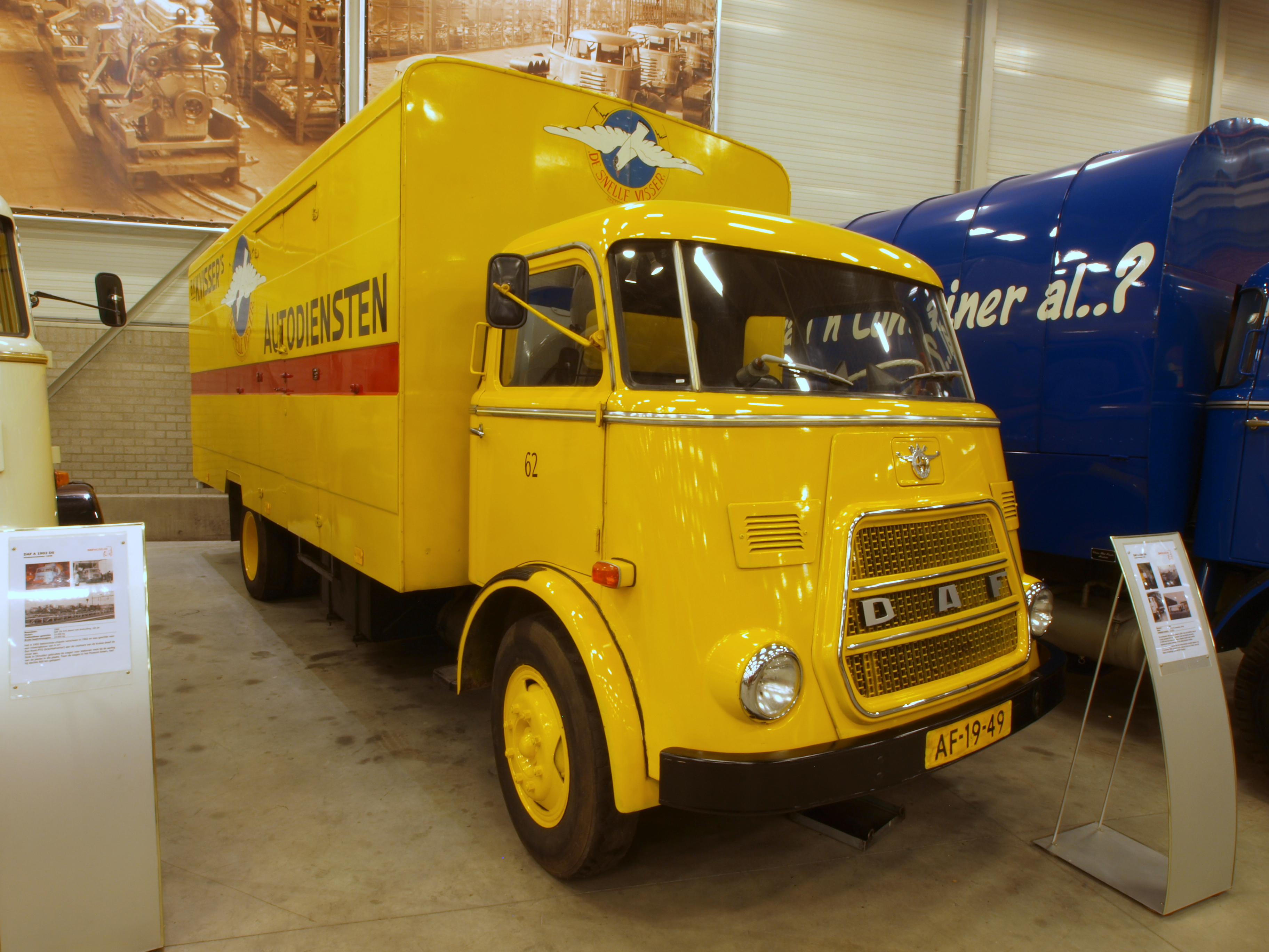 DAF museum